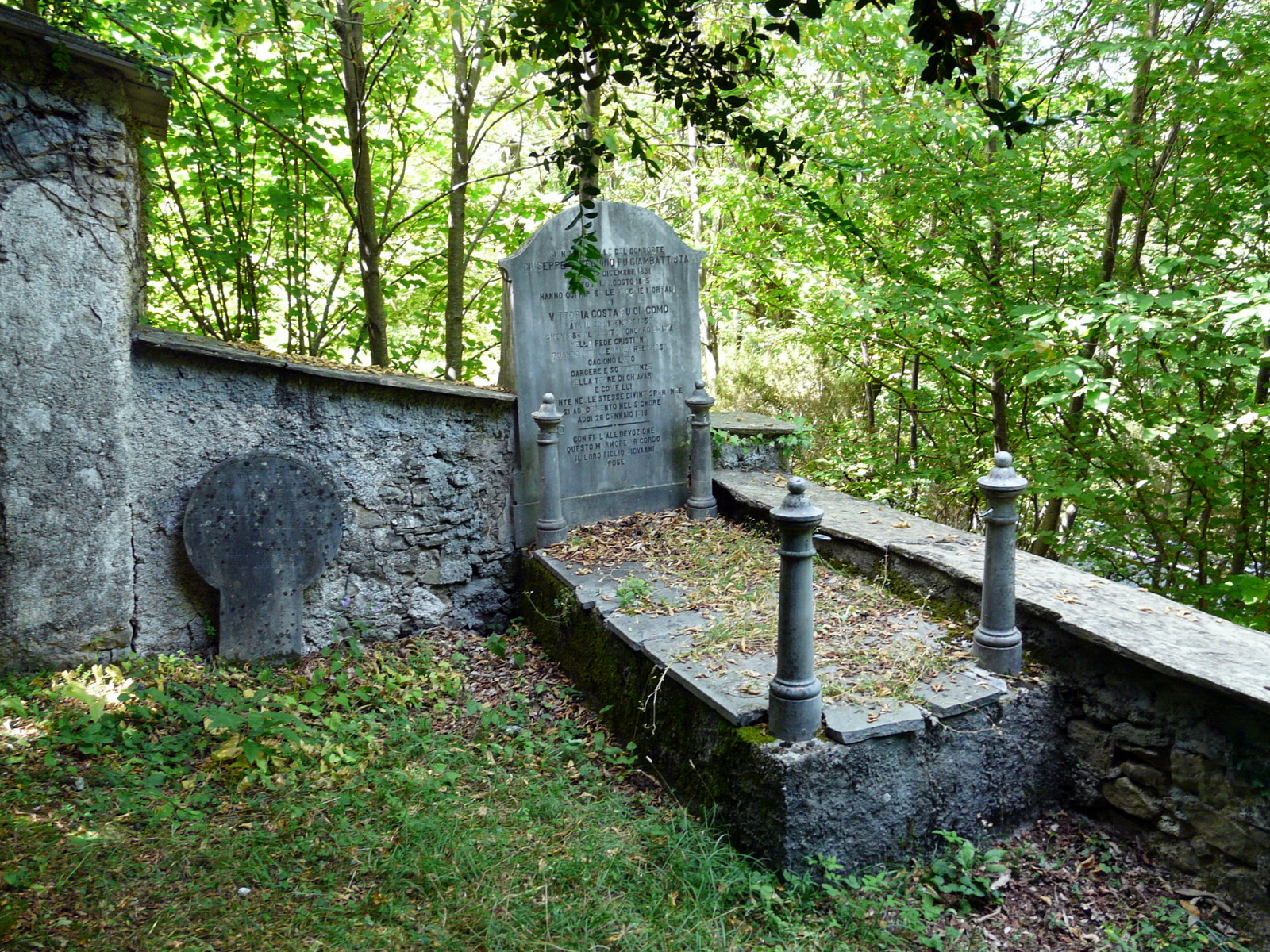 Cimitero dell'ottocentesca comunità valdese, Castello, Favale di Malvaro, Liguria, Italia